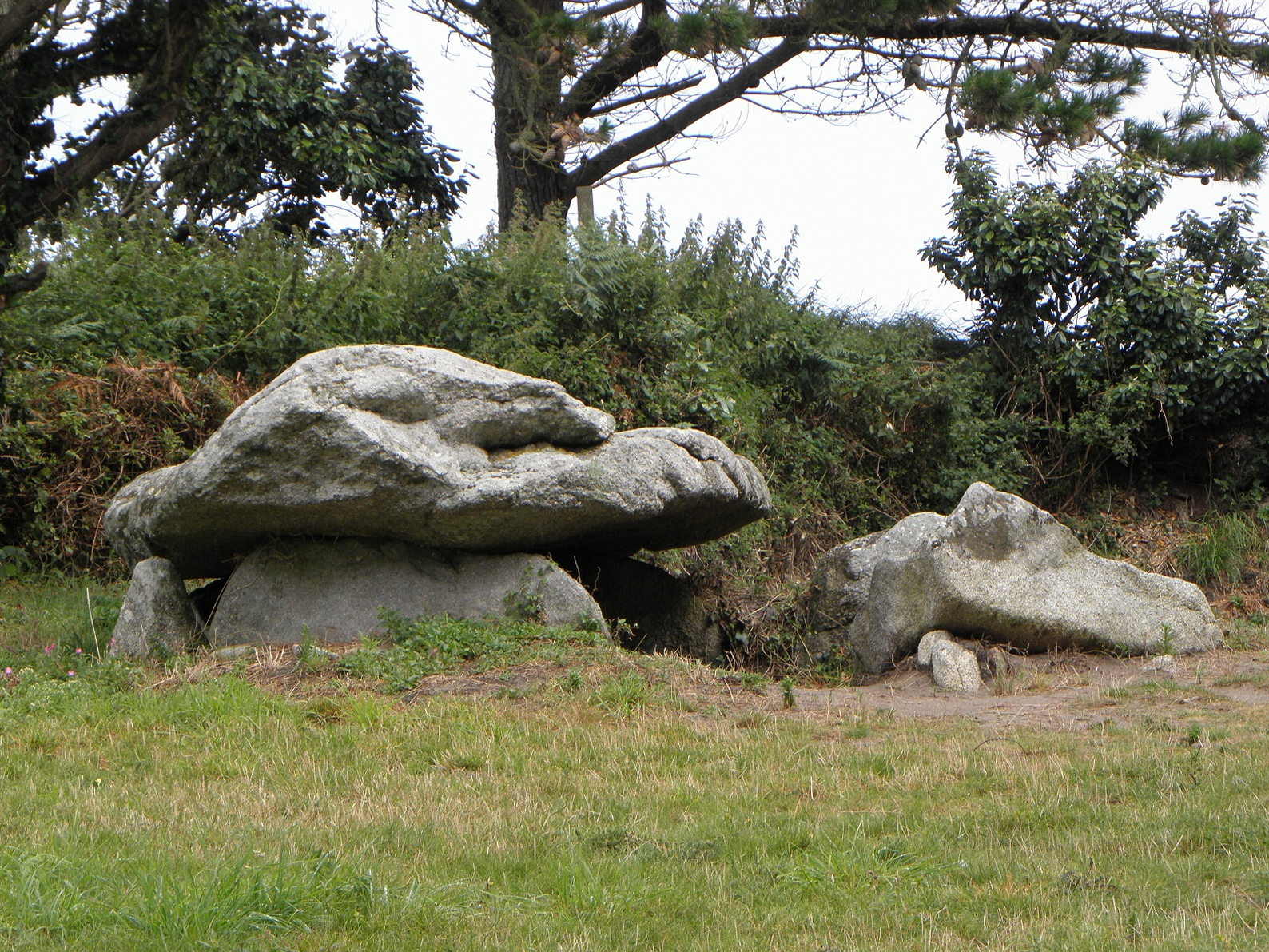 Dolmen de Saint-Gonveld sis à Argenton en Landunvez (29).